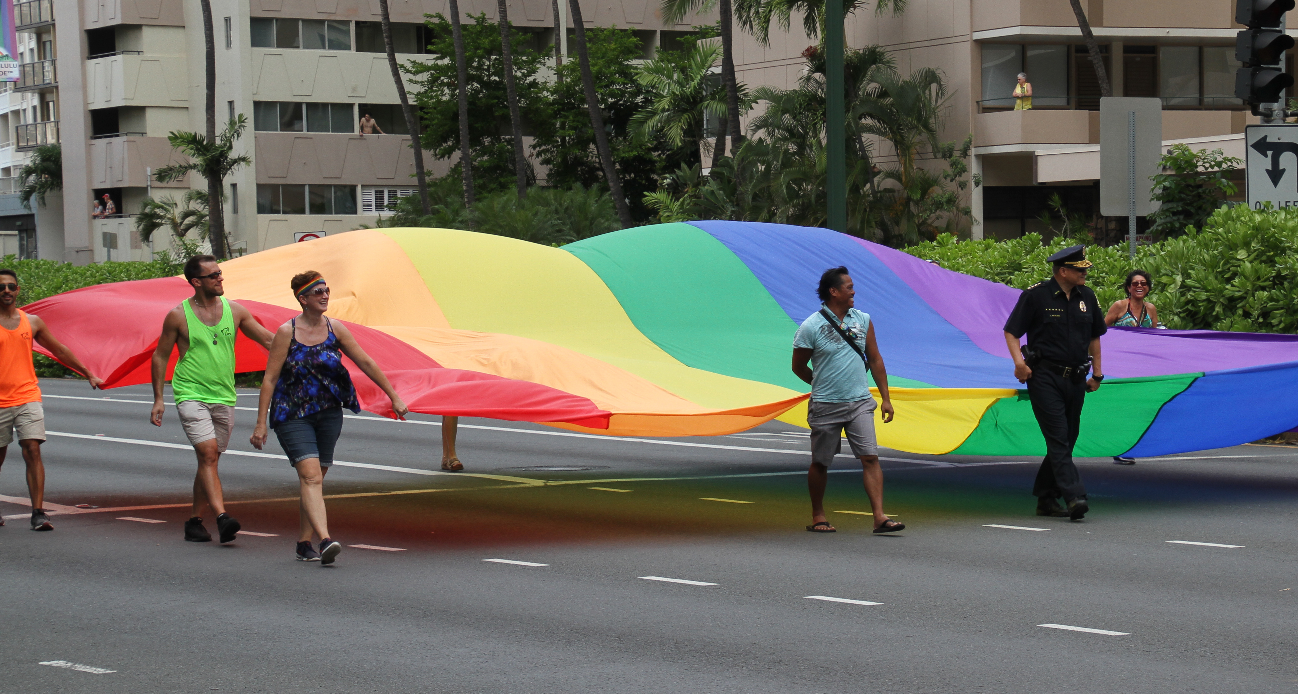 Honolulu Gay Pride Parade 16